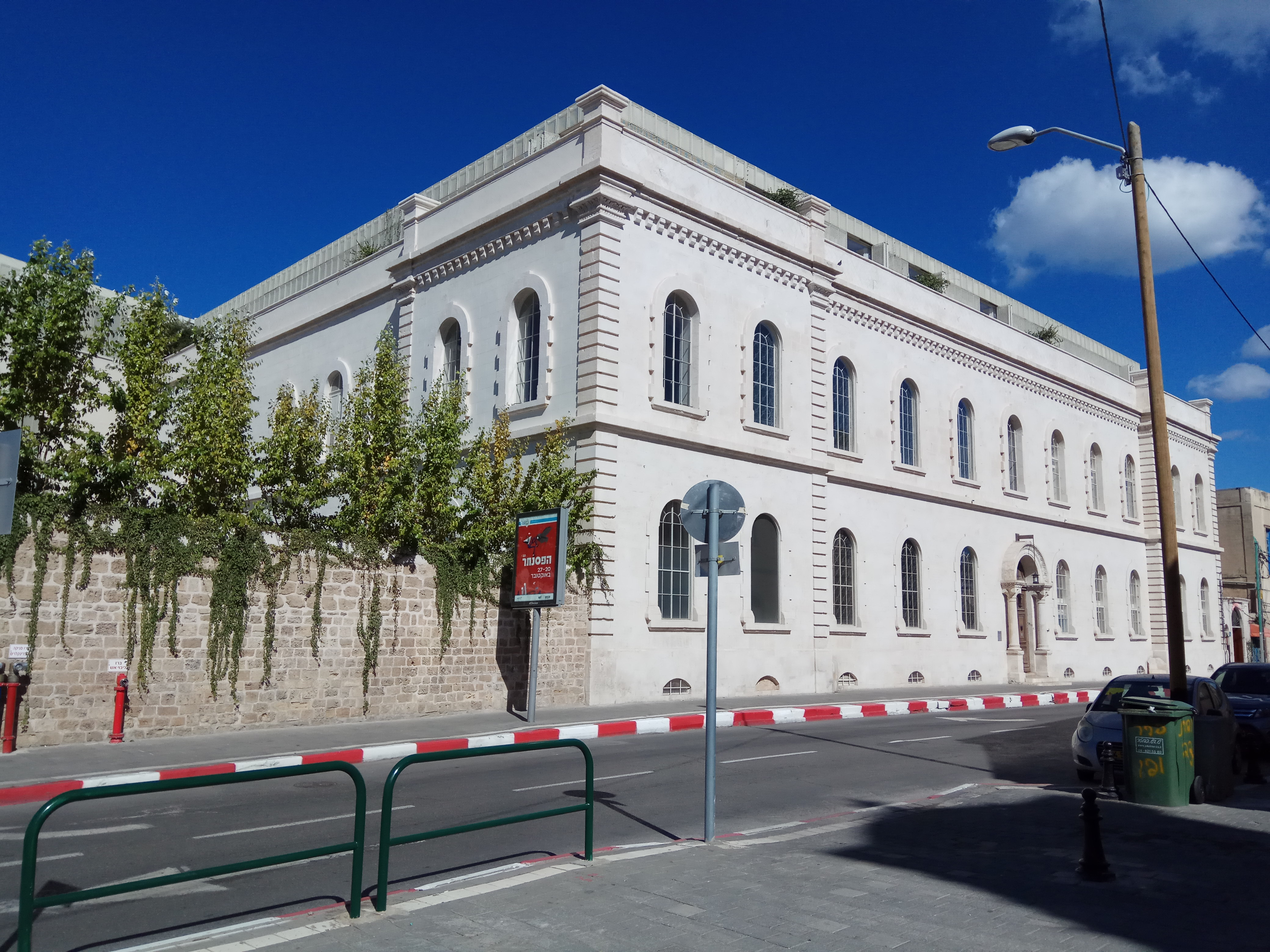 מלון יפו ברחוב יפת ביפו